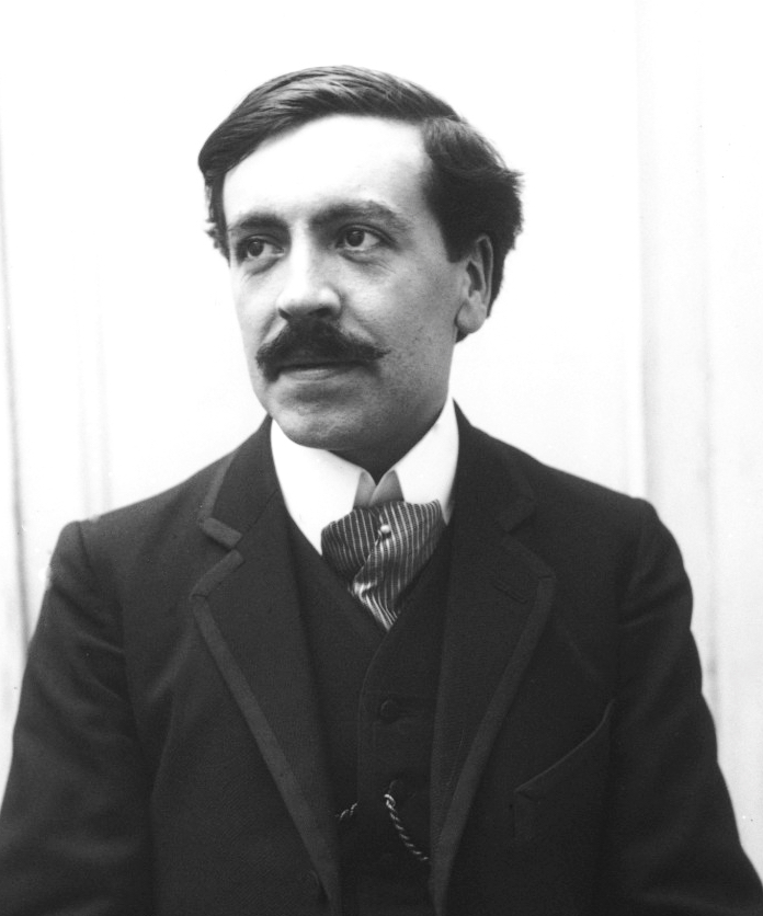 Jules Bertaut, historien, essayiste, critique littéraire, 1913 (ou avant)